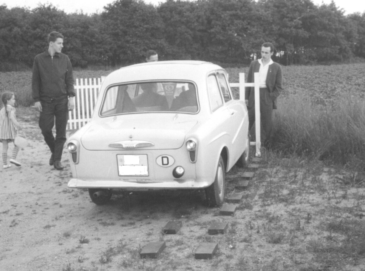 ein zeitgenössisches Foto, damals war es noch "Das große Goggomobil" (bis 1960 hatte der Wagen diese Rückleuchten und die kleine Heckscheibe)